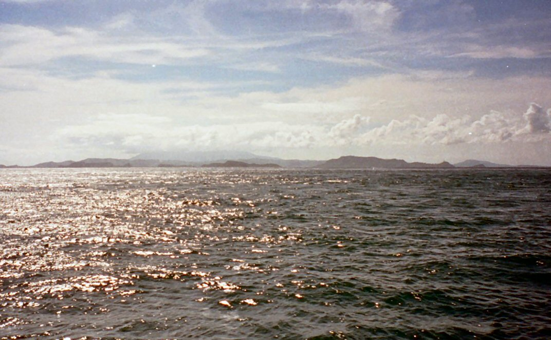 Pulau Sangiang - Sunda straat - Indonesie - Eigen werk